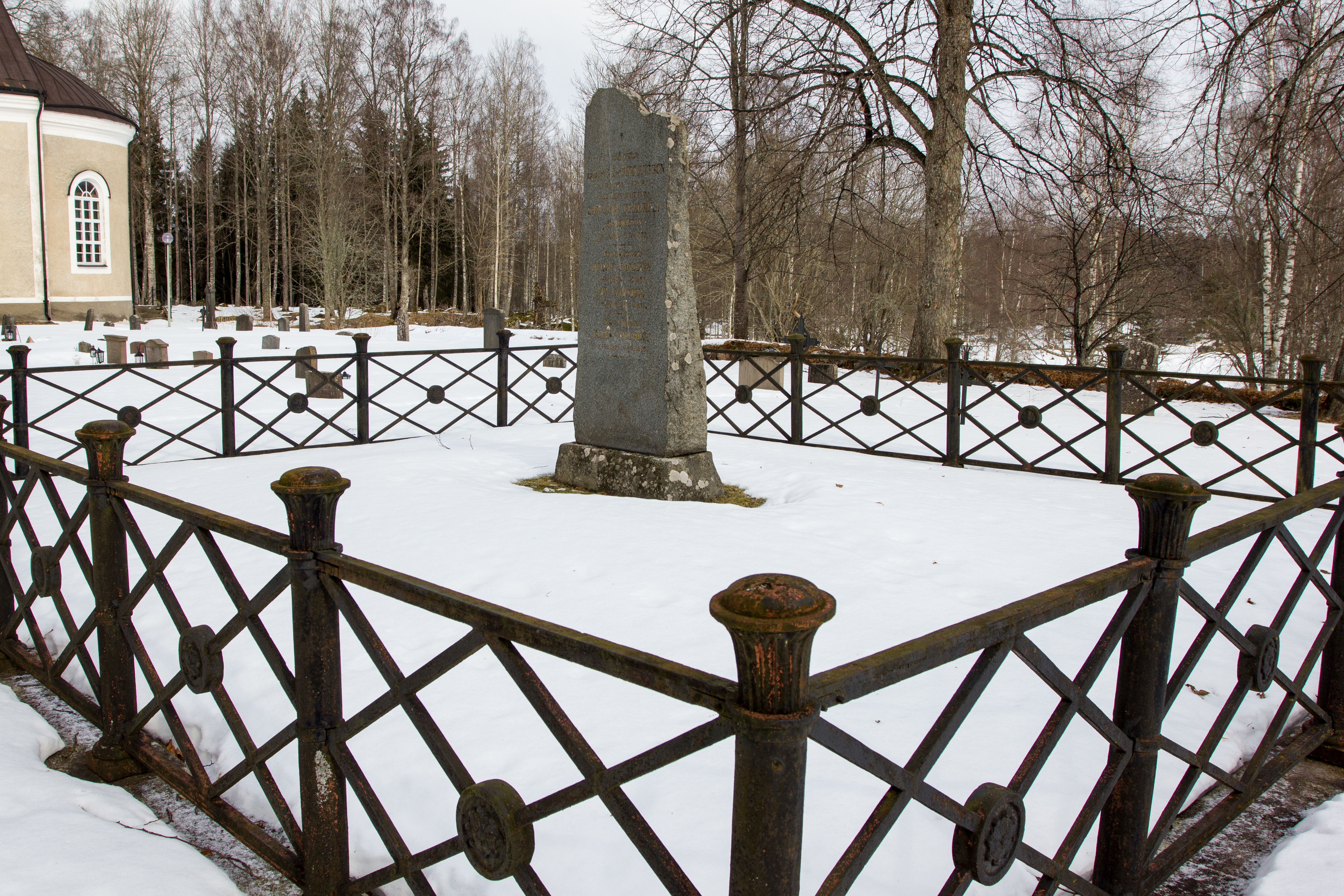 Bruksherren vid Färna bruk Carl Johan von Hermanssons grav på Gunnilbo kyrkogård, Skinnskattebergs kommun, Sverige.